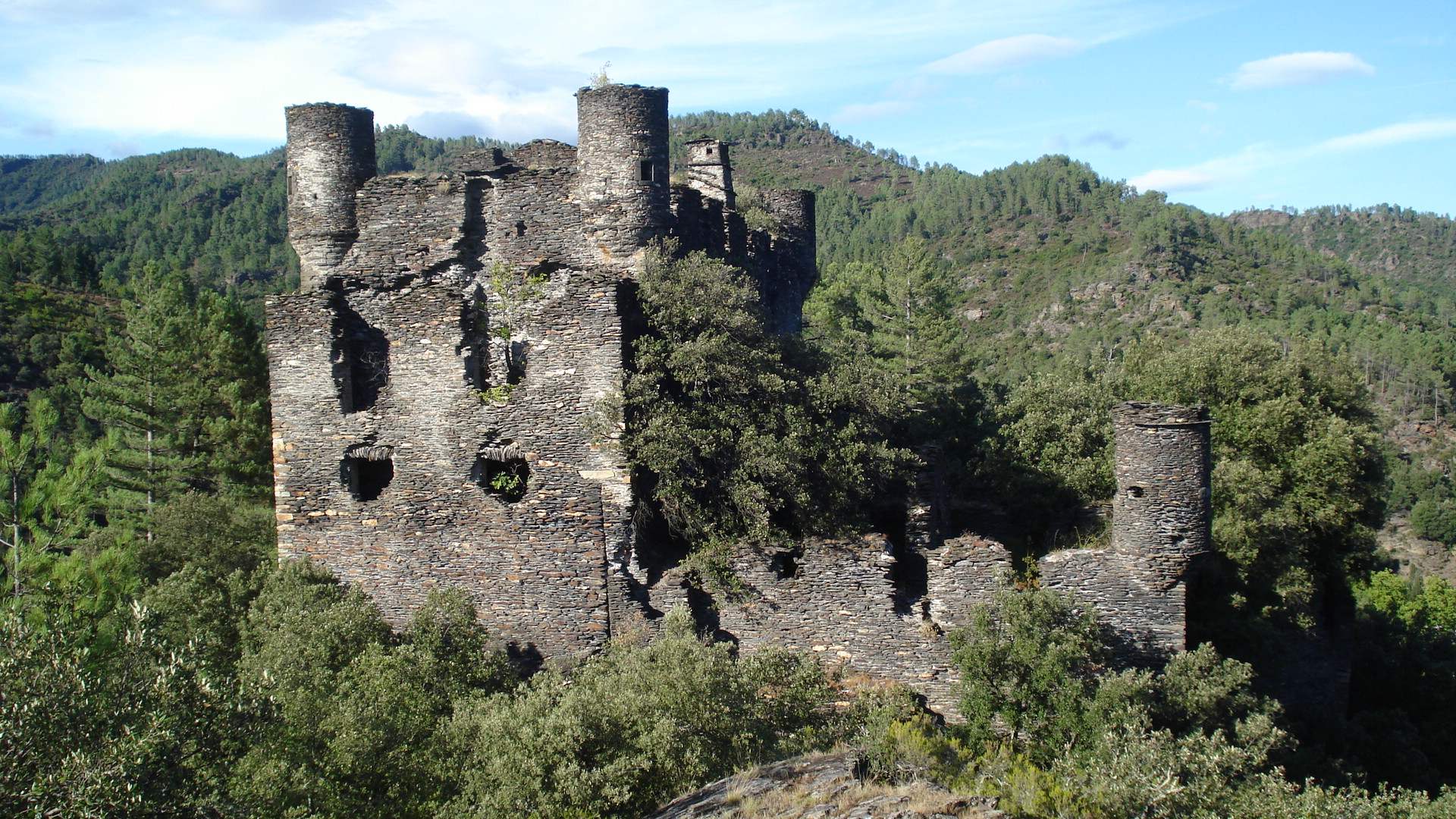 Château de Moissac-Vallée-Française vu du sud à Moissac-Vallée-Française Lozère France